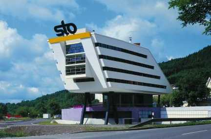 Building K, Sto AG Baustein Ergebnis